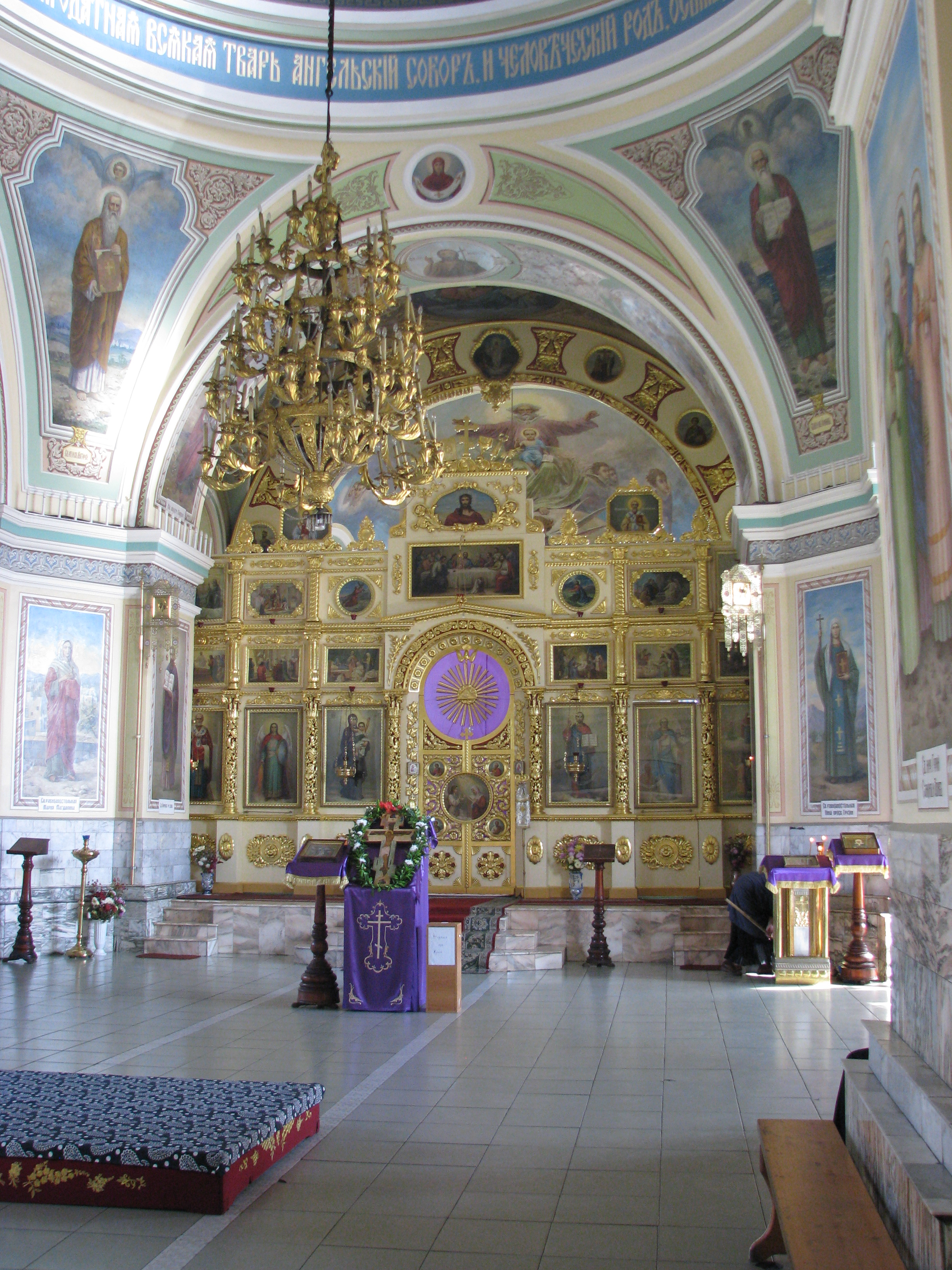 Внутреннее убранство Покровского кафедрального собора (Барнаул), вид на Царские врата